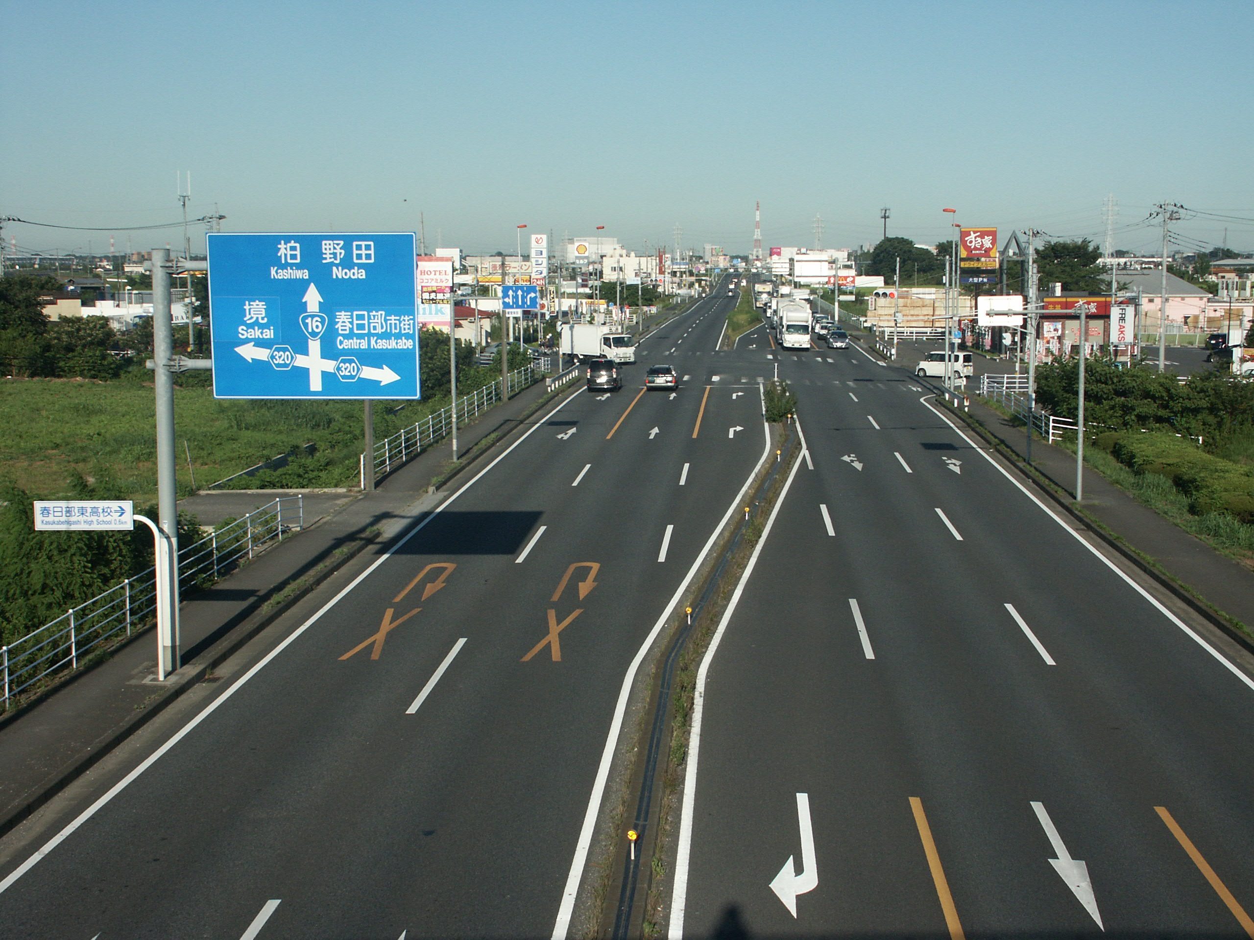 国道16号線春日部野田バイパス野田方面を春日部市不動院野歩道橋から撮影